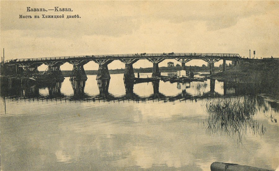 Вид на Кизический мост начала 20 века